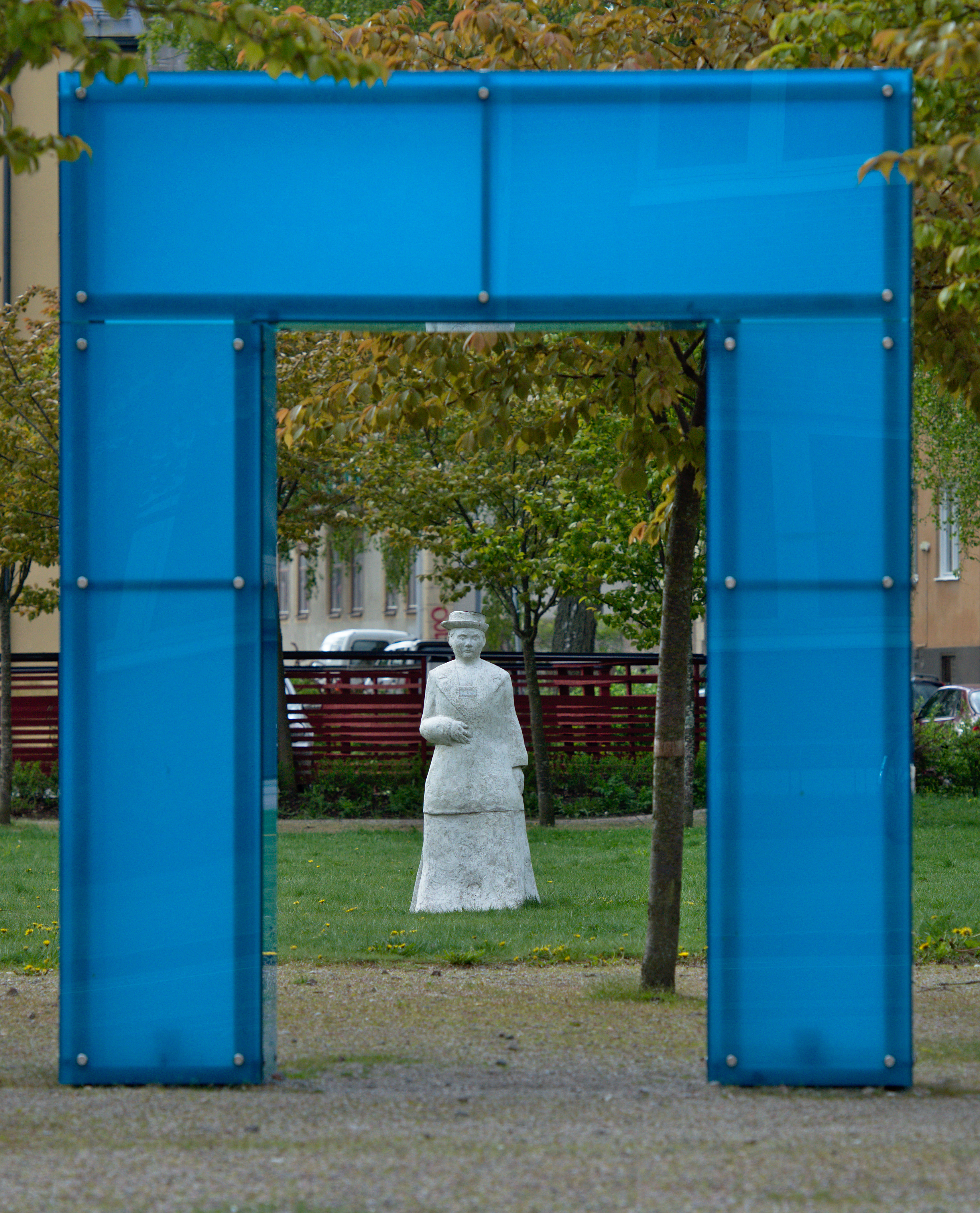 Augusta på spåret - Ulrika Florin, 2009, Augusta Widebecksparken i Strängnäs i Strängnäs kommun.